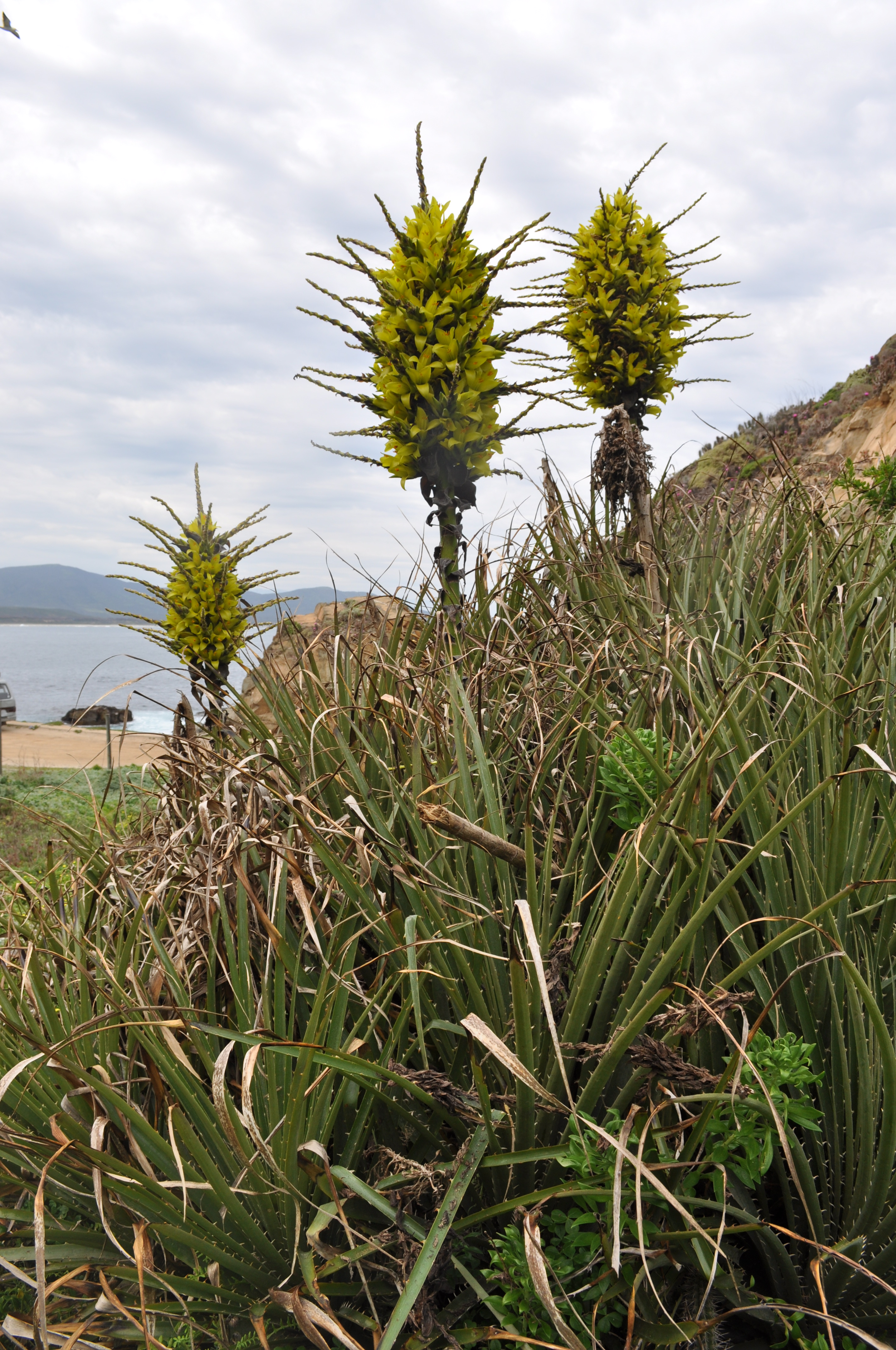 Especie: Puya chilensis. Género: Puya. Familia: Bromeliaceae. Nombres comunes locales: Chagual, chagual grande, cardón, montera. Distribución geográfica: El chagual es endémico de Chile. Crece en las áreas costeras de suelo rocoso entre la IV y la VII región. Características: La planta es perenne y alcanza una altura de hasta 4 metros, con hojas largas, de orilla espinosa y unidas en la base de la planta. Flores agrupadas en una gran inflorescencia que alcanza algo más de un metro de altura. La flores (hermafroditas) son de color amarillo verdoso. La foto fue tomada en Los Molles, V región de Valparaíso, Chile.